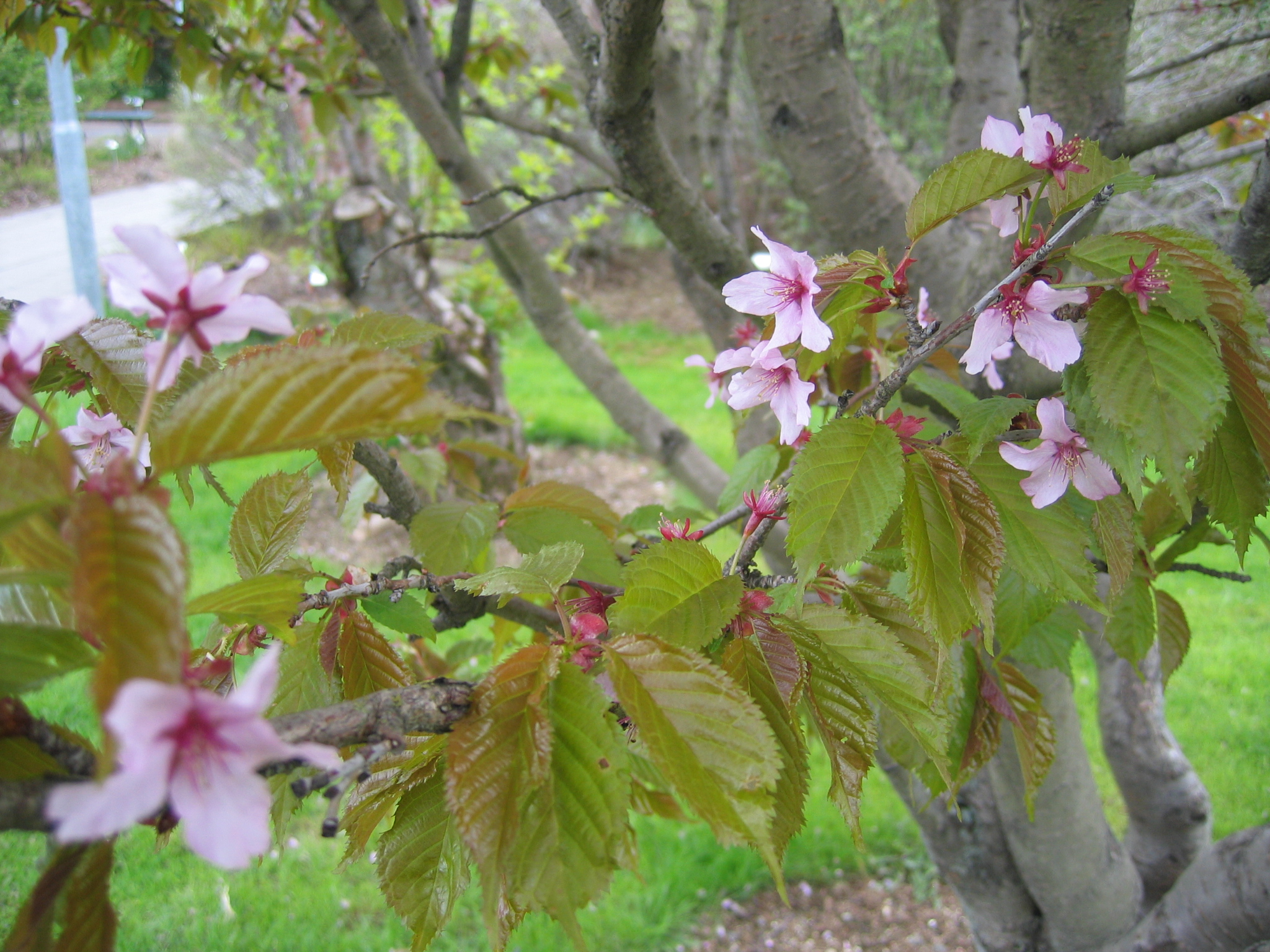 photo taken by Salvör in Grasagarður Reykjavíkur Botanical garden in Reykjavik, Iceland.